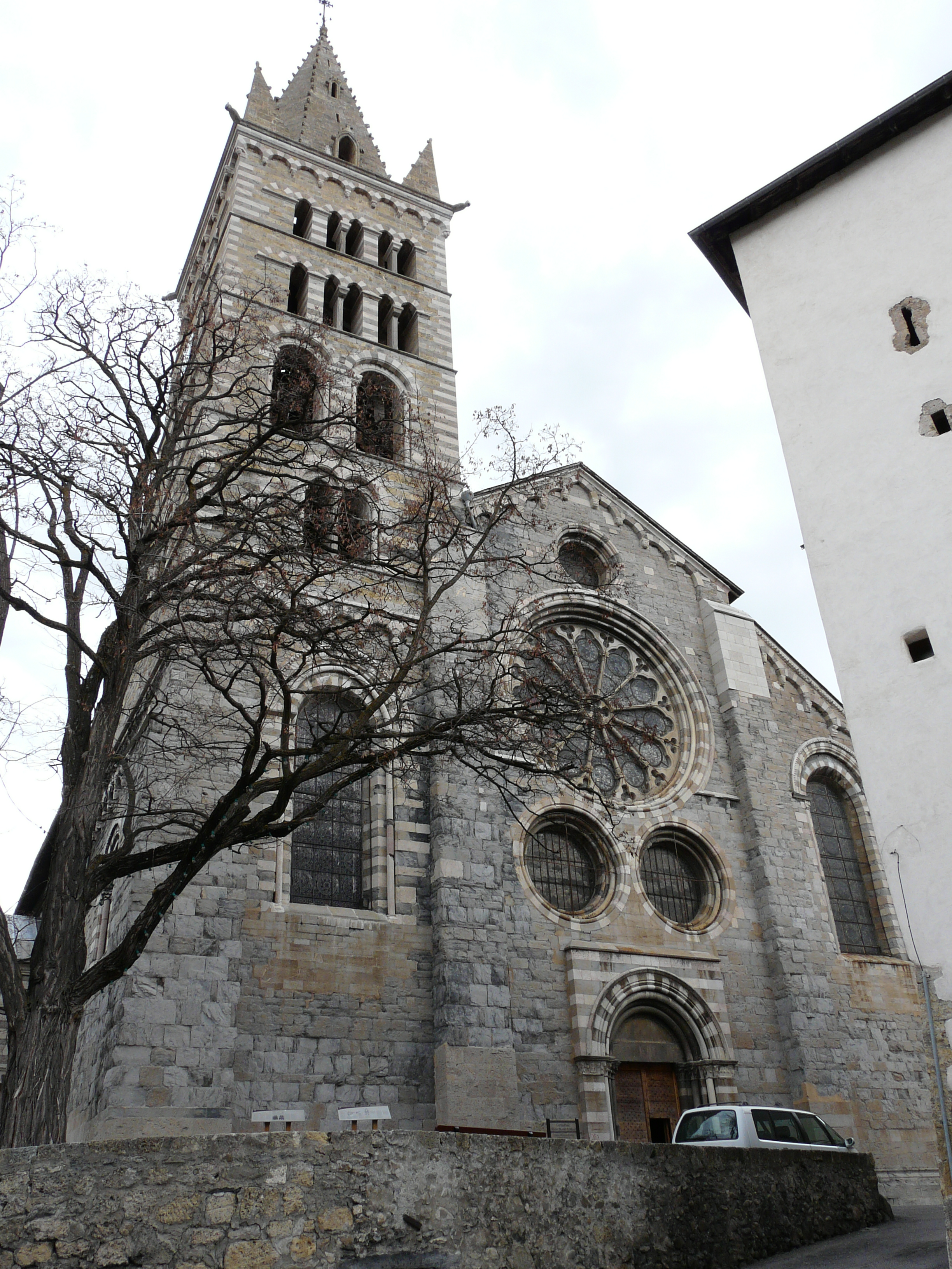 Cathédrale Notre-Dame du Réal. Embrun .